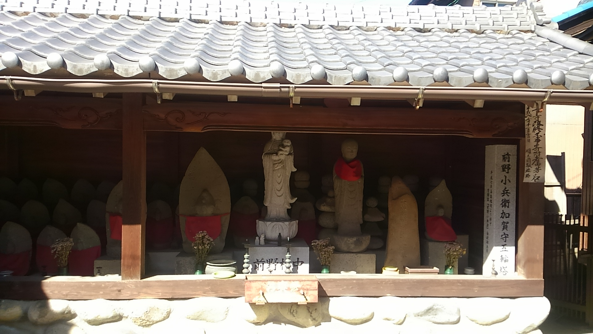 前野一族の供養塔